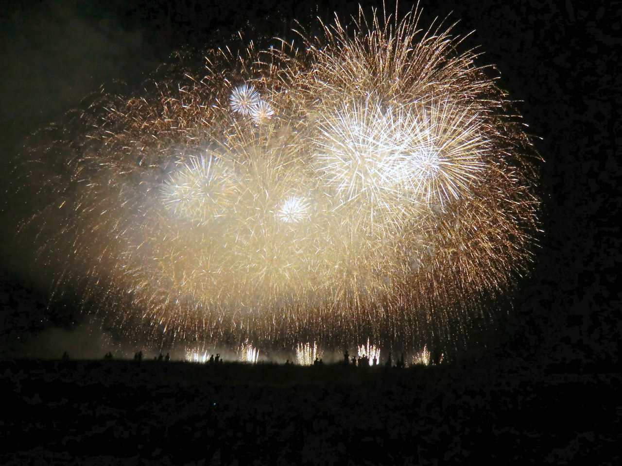 川北まつり北國大花火川北大会（石川県川北町）